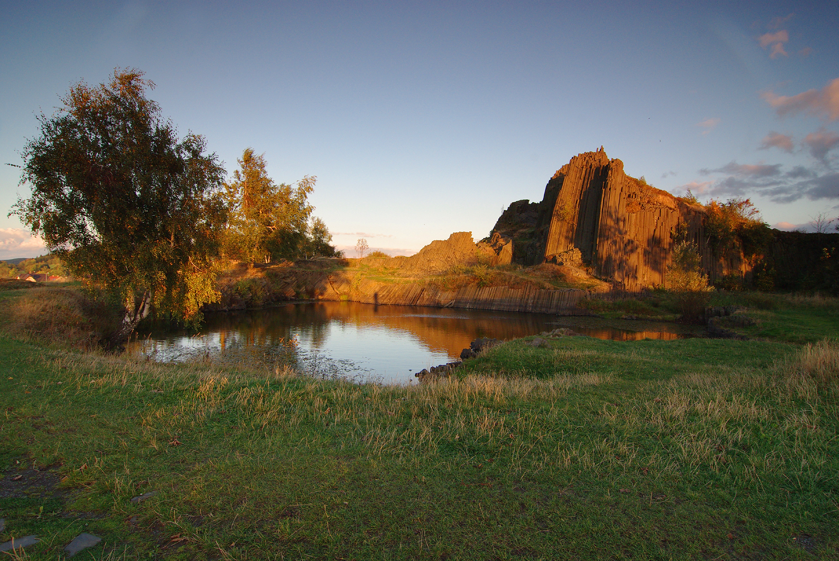 Panská skála